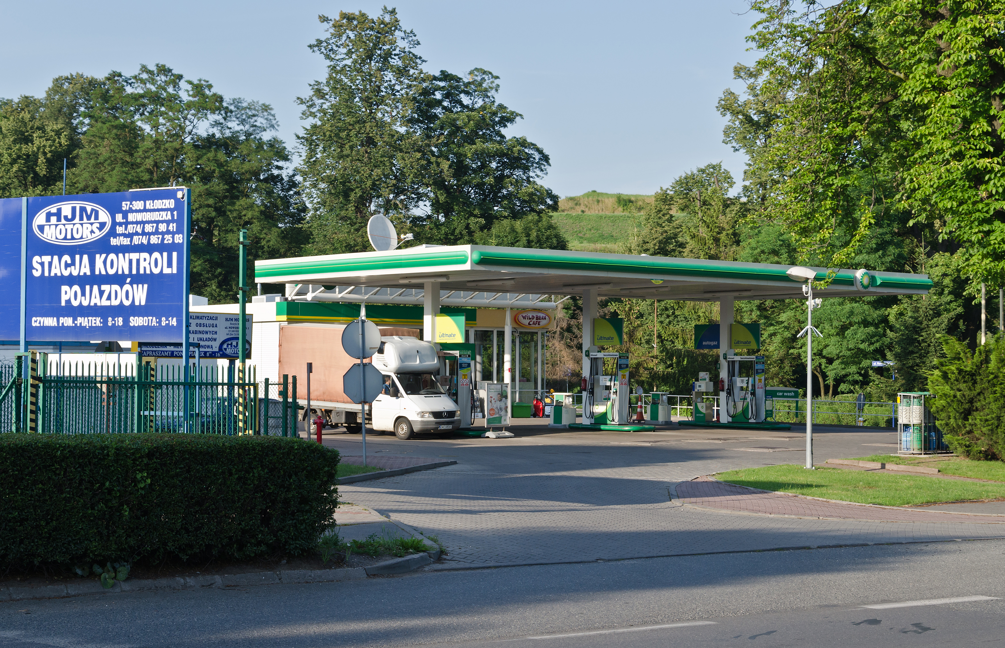 Kłodzko, ul. Noworudzka, stacja paliw